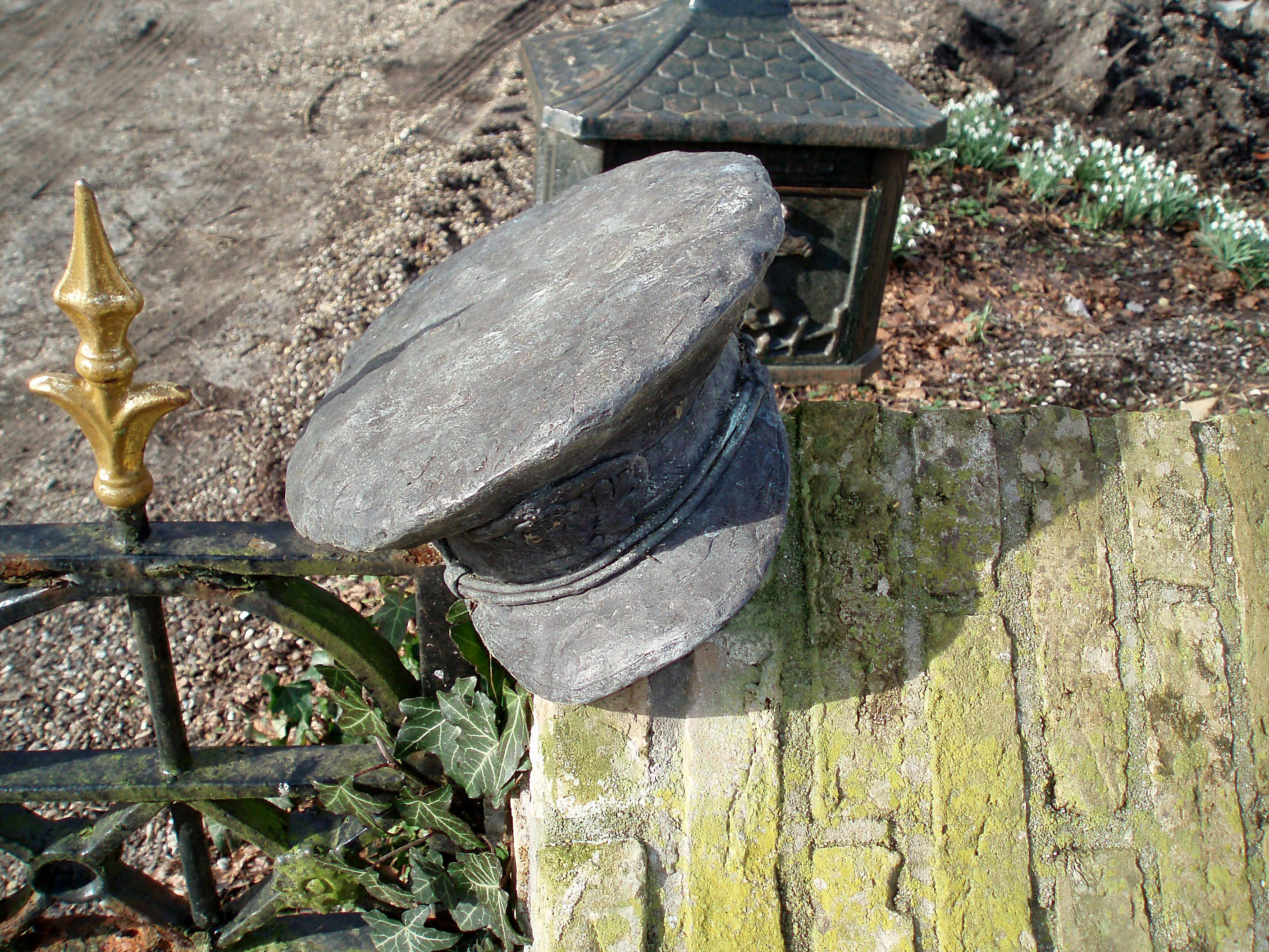 Douwe de Bildt, 1998